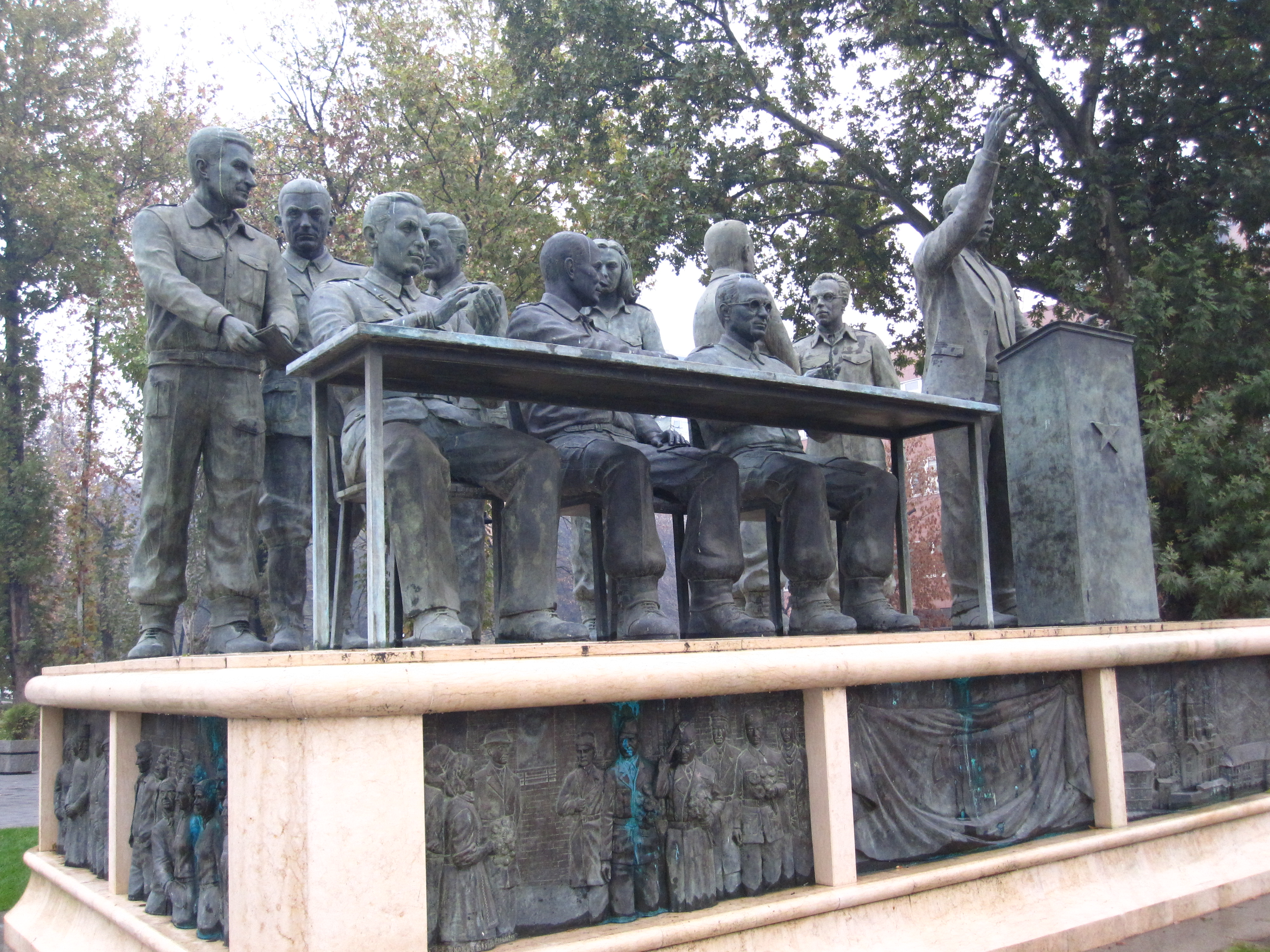 Споменик - Првото заседание на АСНОМ во Жена Парк во Скопје.